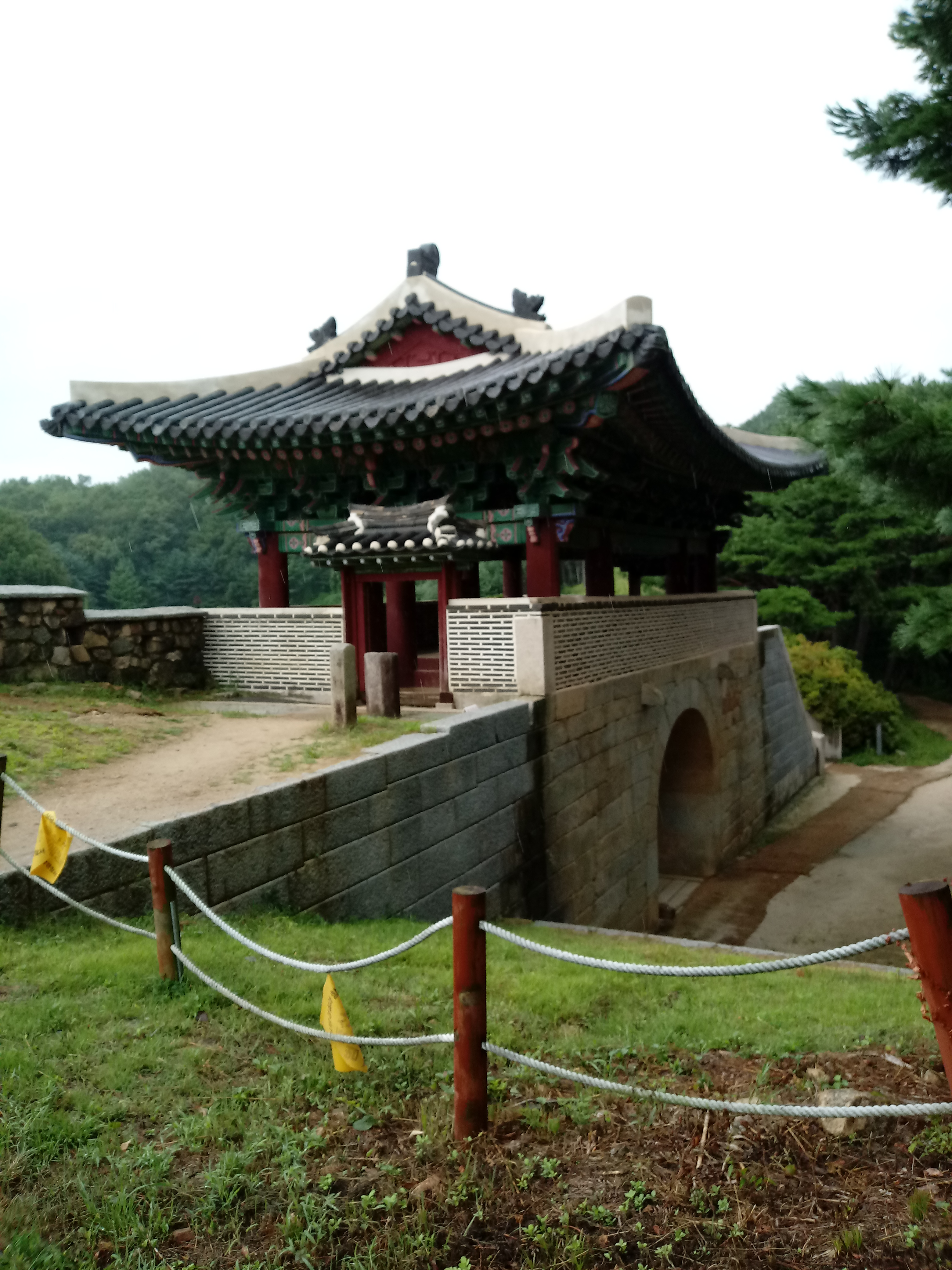 상당산성 남문